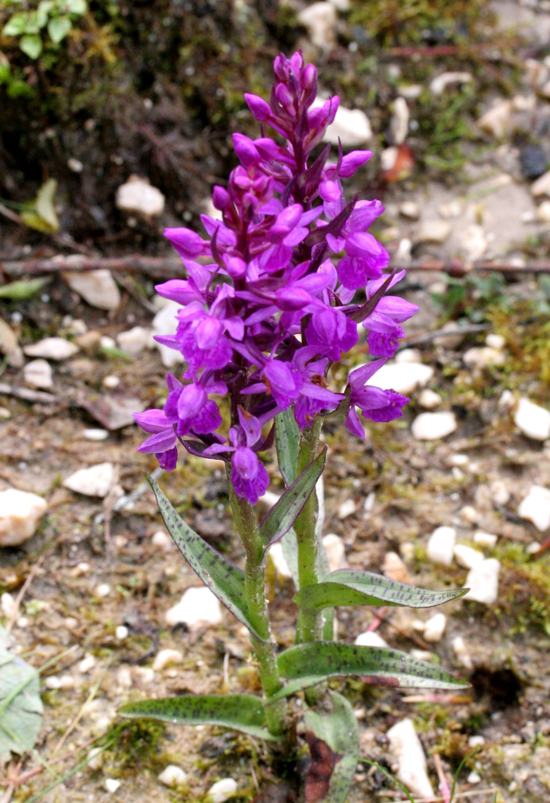 Orchide di Traunsteiner - Località: Giardino Botanico Alpino "Giangio Lorenzoni", Pian Cansiglio, Tambre d'Alpago (BL), 1000 m s.l.m.